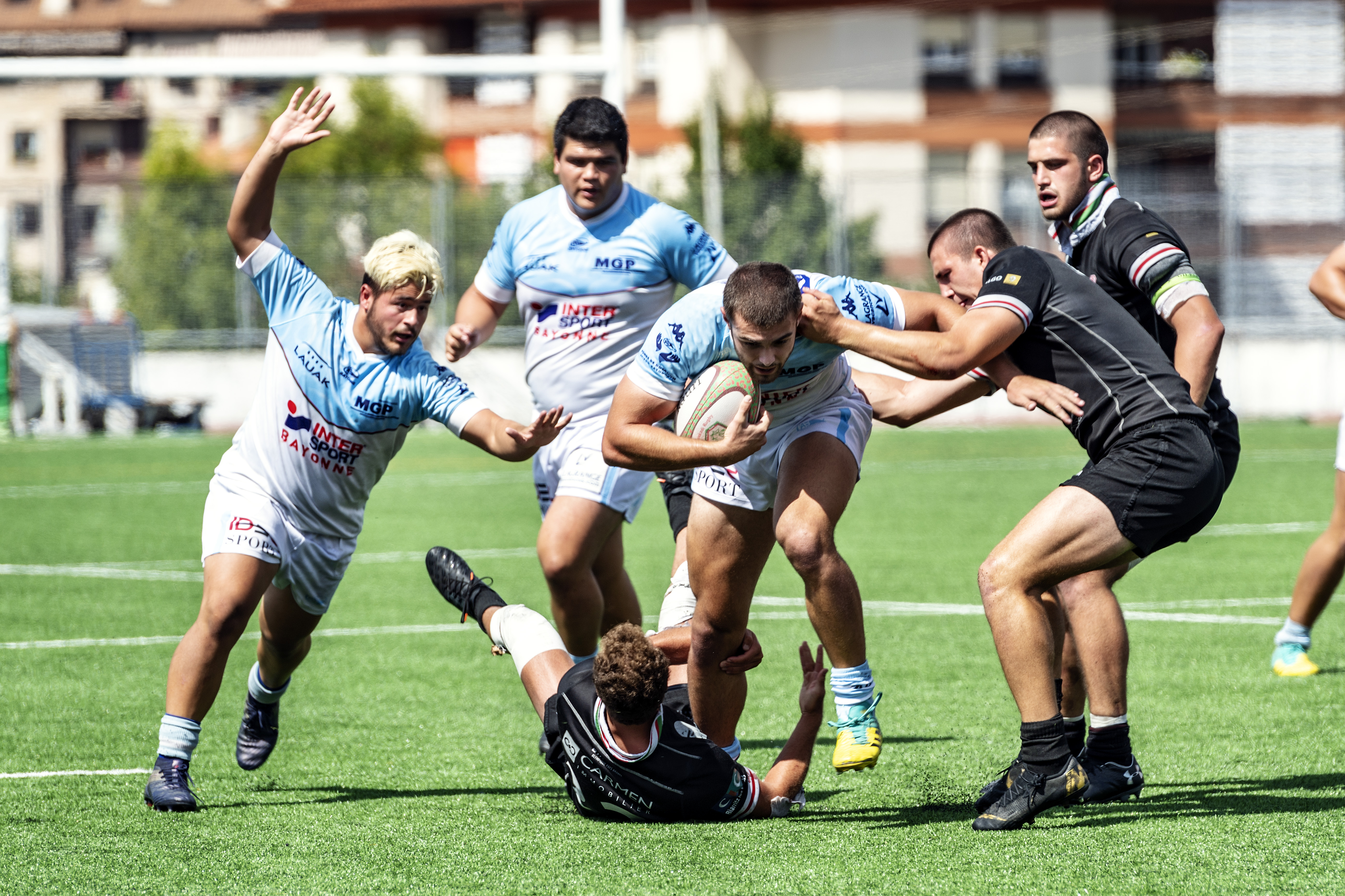 Aviron Bayonnais izan da Euro Basque Rugby Challenge-Euskal Errugbi Ligaren lehen txapelduna